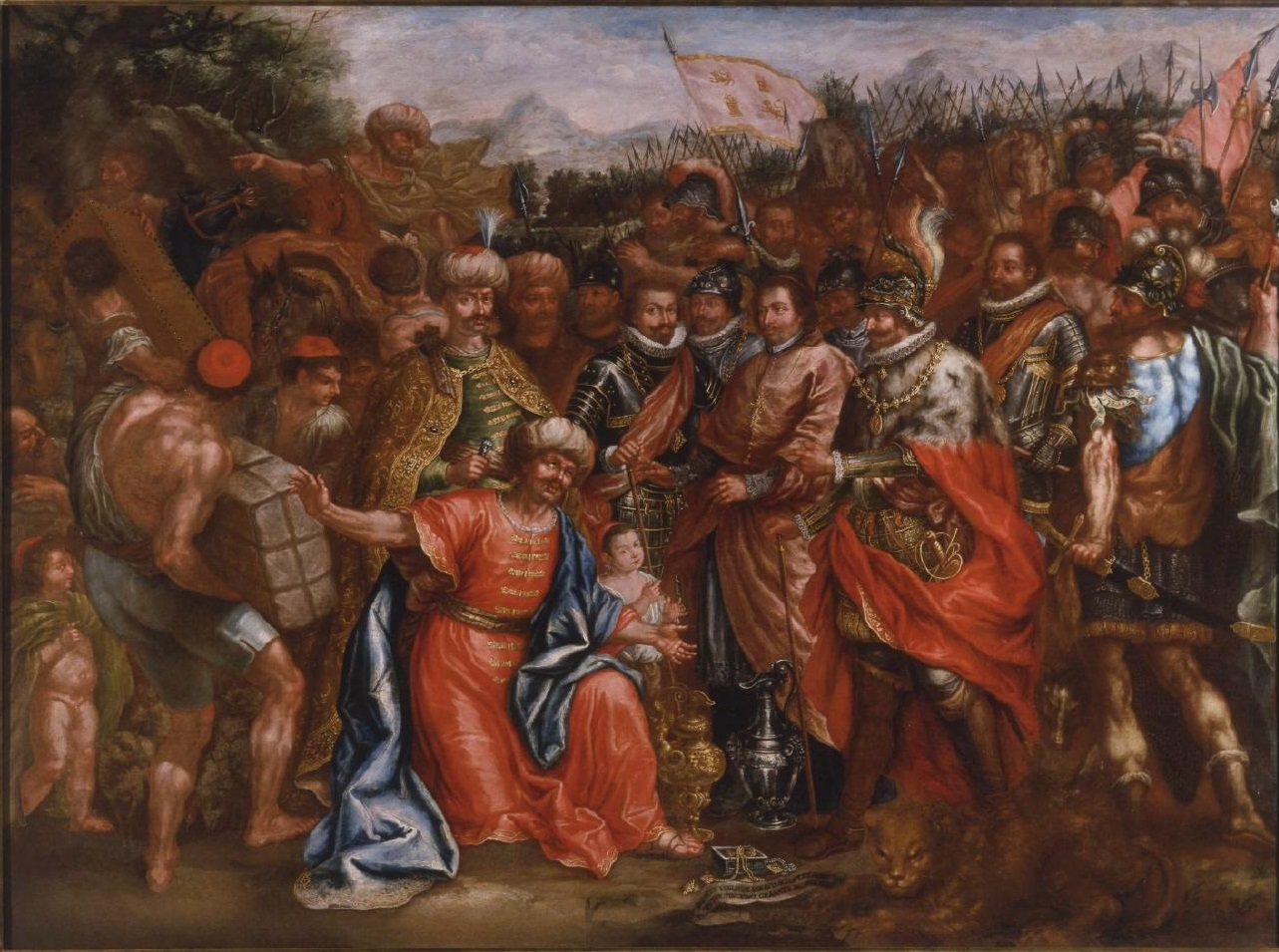 La obra representa a Fernando III el Santo († 1252), rey de Castilla y León, recibiendo la embajada del rey de Fez.